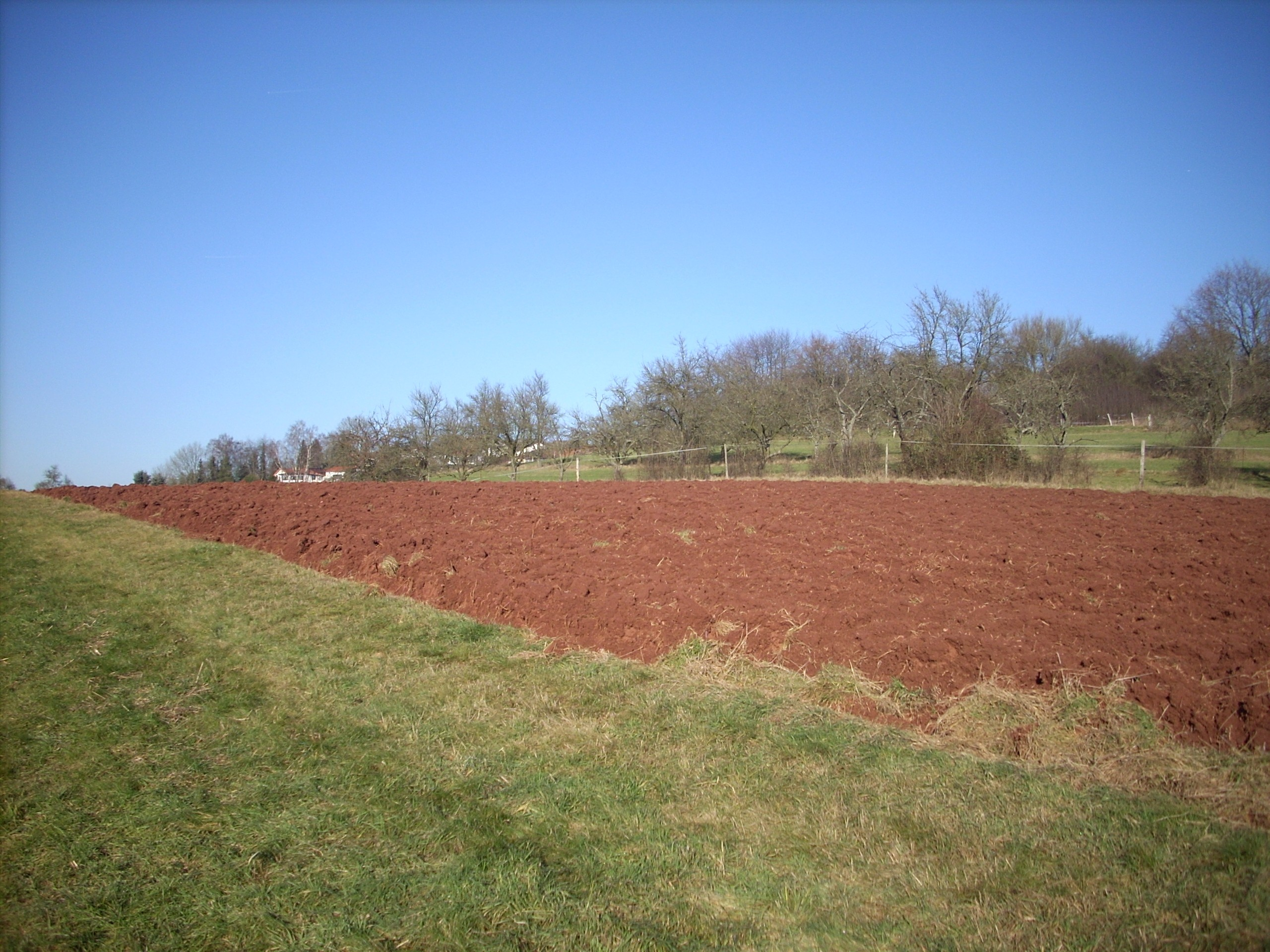 Frisch gepflügter, braunroter Ackerboden, hervorgegangen aus Sedimentgesteinen des Oberrotliegend (nach Falke, 1954: Waderner Gruppe des Saarpfälzischen Rotliegend) bei Namborn (Bliesener Weg), Saarland.